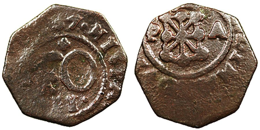 Moneda navarra de cuatro cornados acuñada en 1757, reinando Fernando VI de España. Es una pieza de cobre.